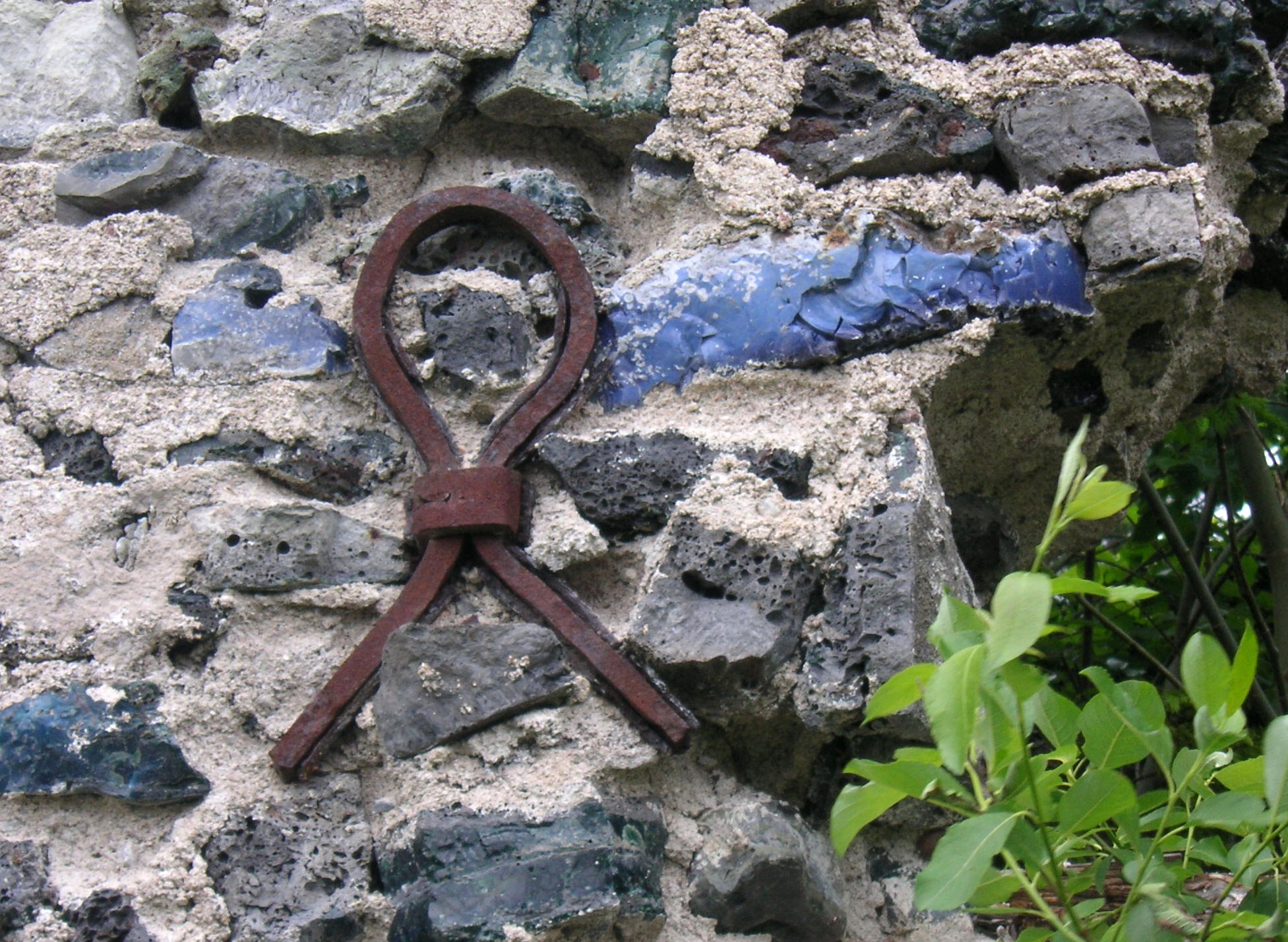 Slaggstensvägg och ankarjärn på "Slaggstensslottet" vid Norhyttan, Dalarna